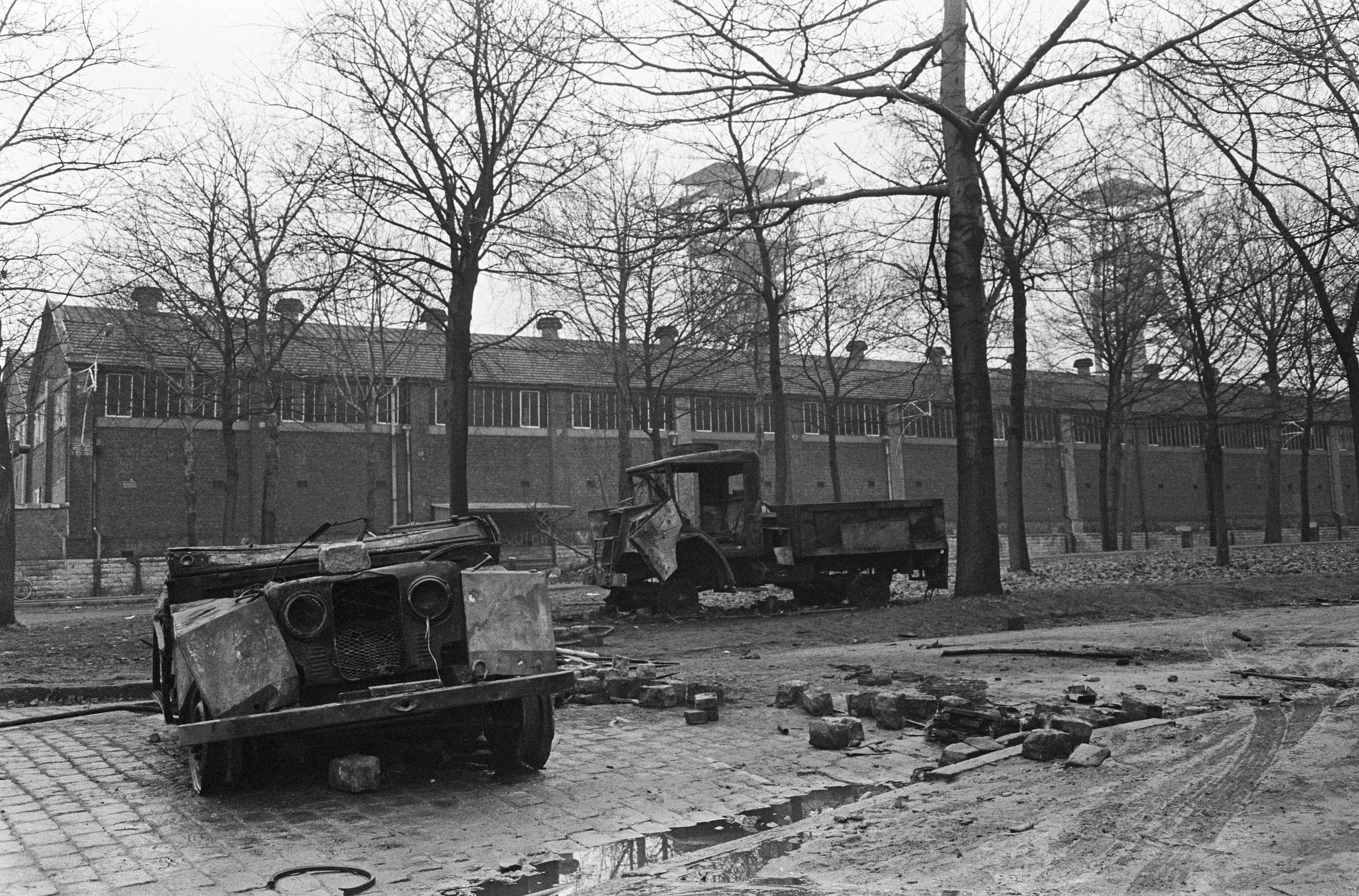 Collectie / Archief : Fotocollectie Anefo Reportage / Serie : [ onbekend ] Beschrijving : De Belgische onlusten rond mijnen te Genk, voor mijn van Zwartberg twee verbrande autos van Gendarmerie Datum : 2 februari 1966 Trefwoorden : MIJNEN, gendarmes Persoonsnaam : Zwartberg Fotograaf : Koch, Eric / Anefo Auteursrechthebbende : Nationaal Archief Materiaalsoort : Negatief (zwart/wit) Nummer archiefinventaris : bekijk toegang 2.24.01.05 Bestanddeelnummer : 918-7395